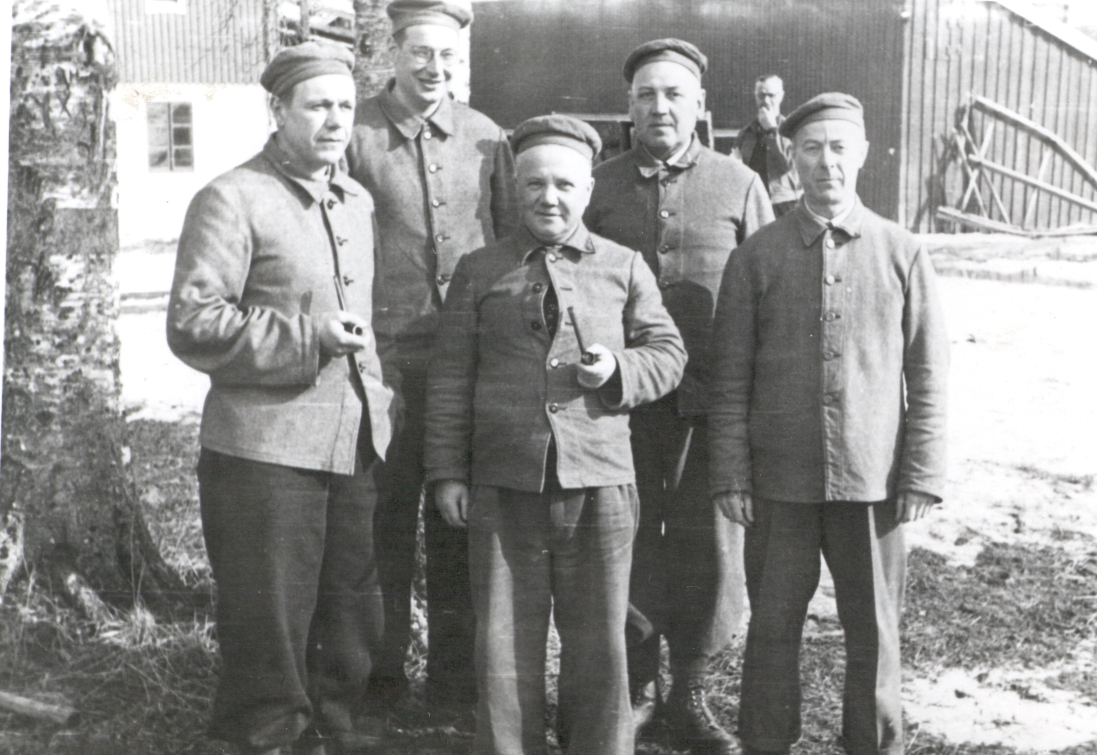 Fem fanger på Falstad Nedre 1942. Fra venstre: Fredrik von der Lippe, Arne Tømmeraas, Ingvald Bernhoff Jacobsen, John Aae og Ivar Skjånes. Five prisoners at Falstad Nedre 1942. From the left: Fredrik von der Lippe, Arne Tømmeraas, Ingvald Bernhoff Jacobsen, John Aae and Ivar Skjånes. Dato / Date: 1942. Fotograf / Photographer: ukjent / unknown. Sted / Place: Ekne, Nord-Trøndelag, Norge / Norway. Arkivreferanse /Archive reference: FSM foto 0700185.